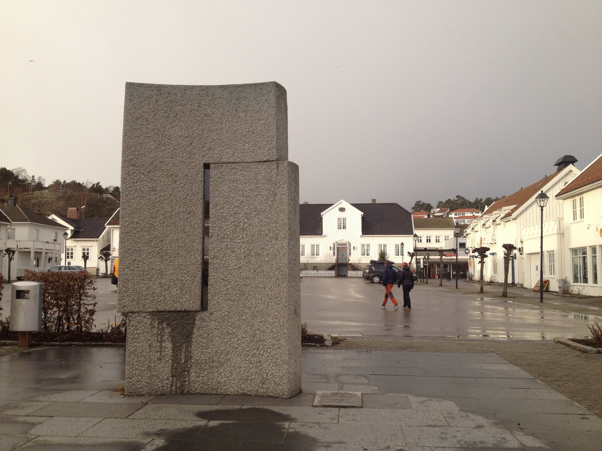 Lillesand torg med minnesmerke over Kristian Lofthus (1750–1797), som sto bak Lofthusopprøret. Kunstner: Gunn Harbitz.